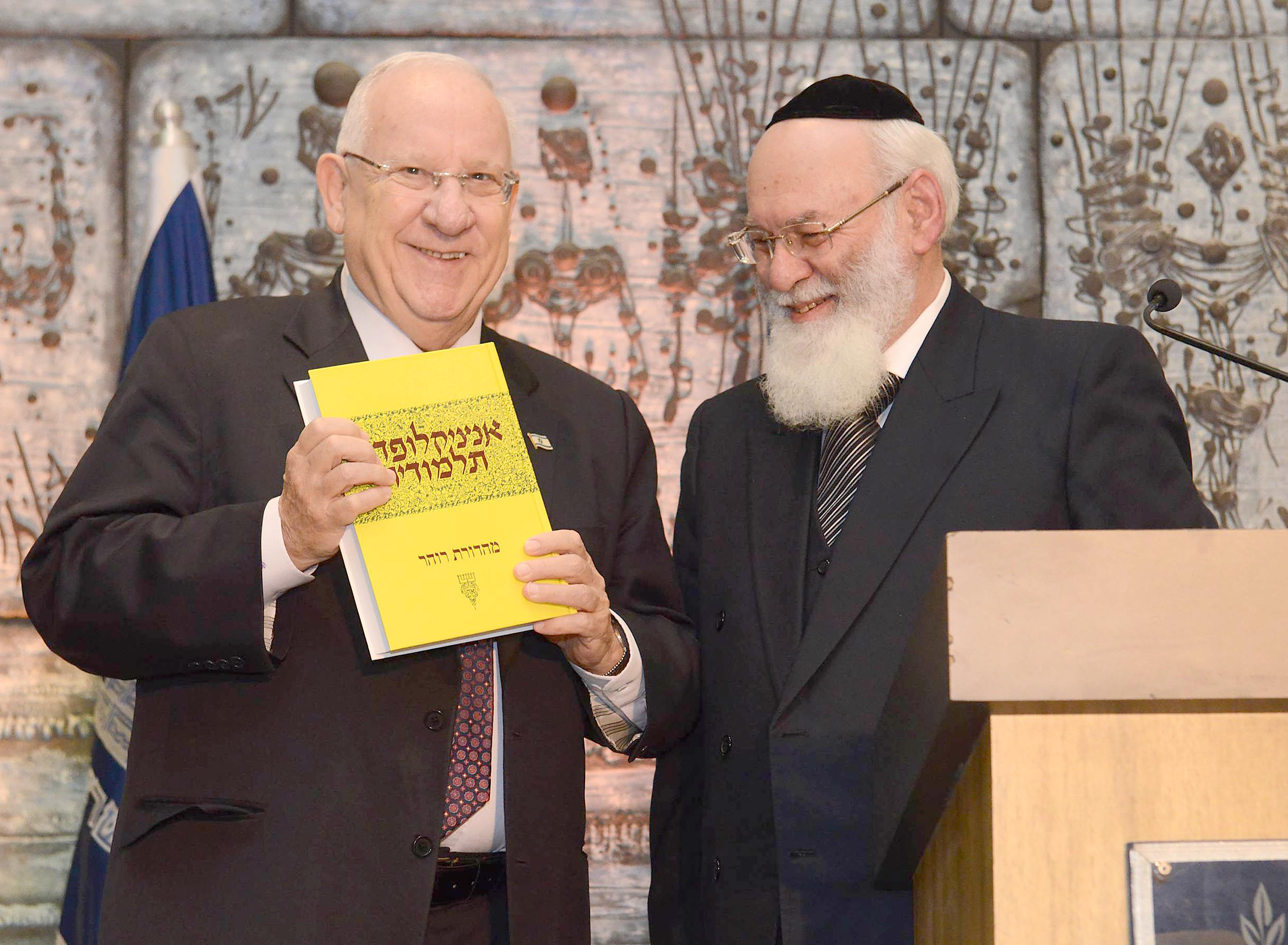 אירוע לציון 70 שנה לאנציקלופדיה התלמודית במשכן נשיא מדינת ישראל פרופ' אברהם שטיינברג נותן לנשיא המדינה ראובן ריבלין, כרך מהודר מהאנציקלופדיה התלמודית.